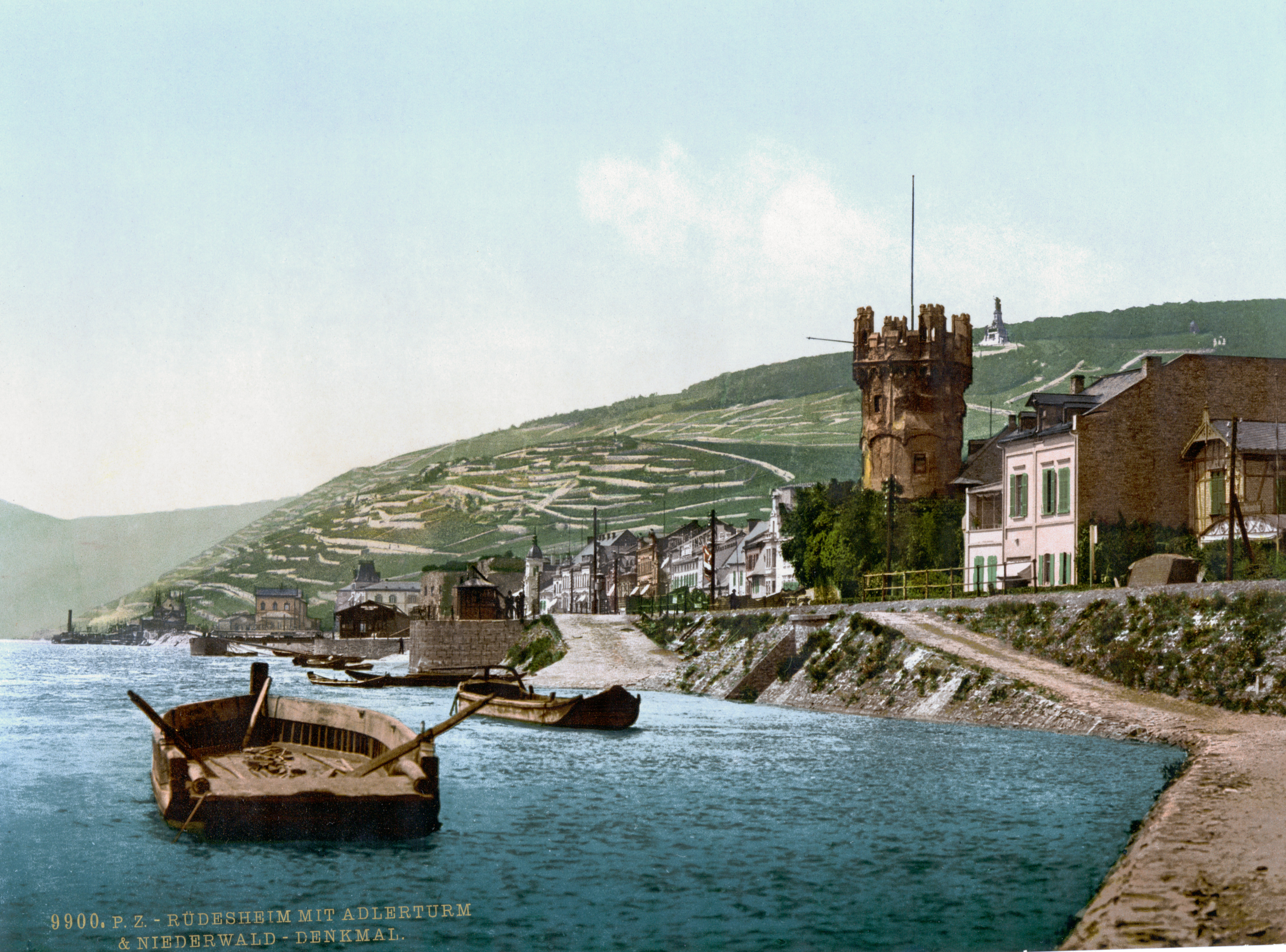 Niederwalddenkmal Rüdesheim Adlerturm